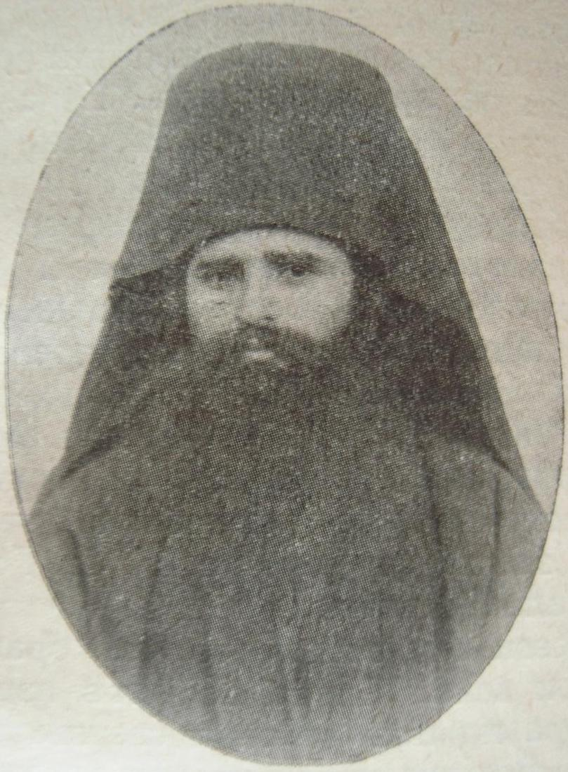 Владимир Зографски